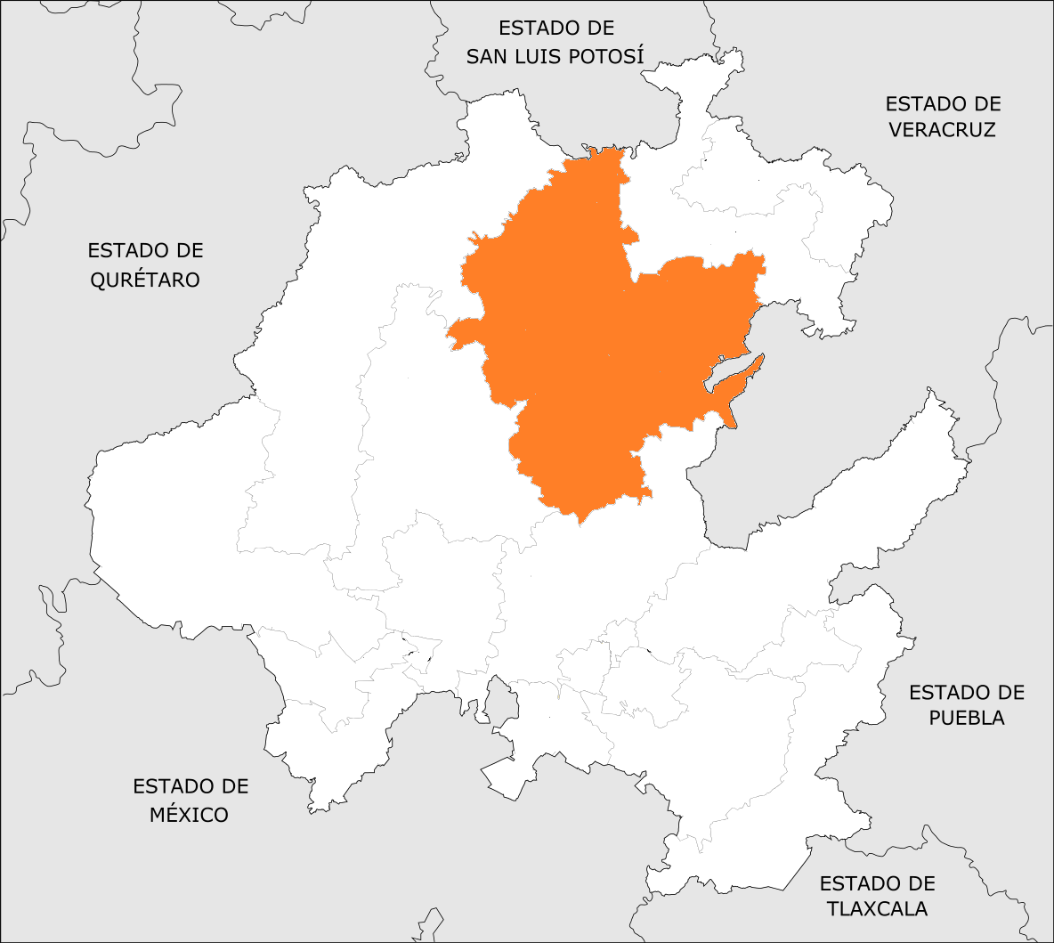 Distrito Electoral Local de Hidalgo 02